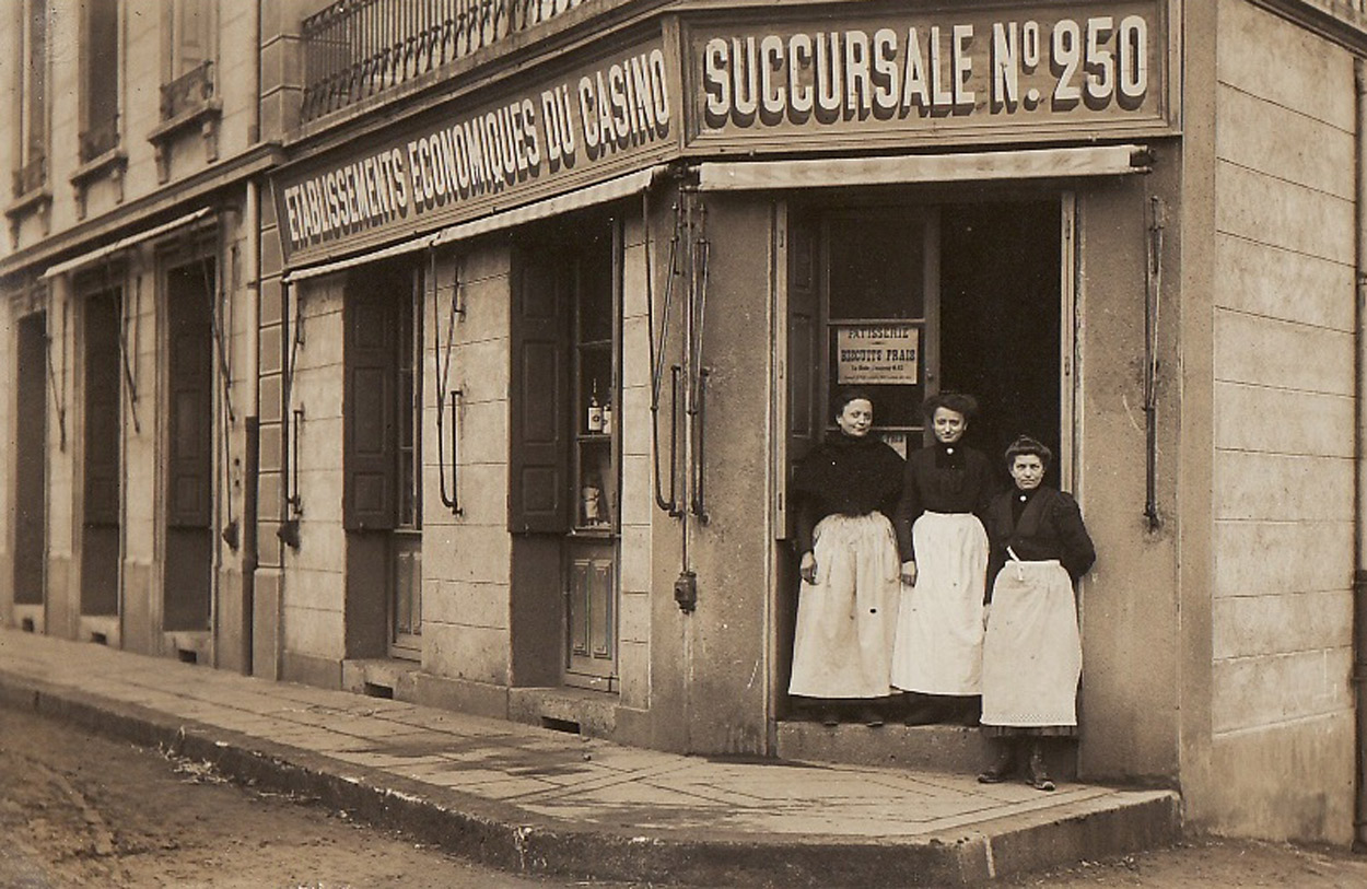 Une succursale d'alimentation en 1900, lancée par Geoffroy Guichard.